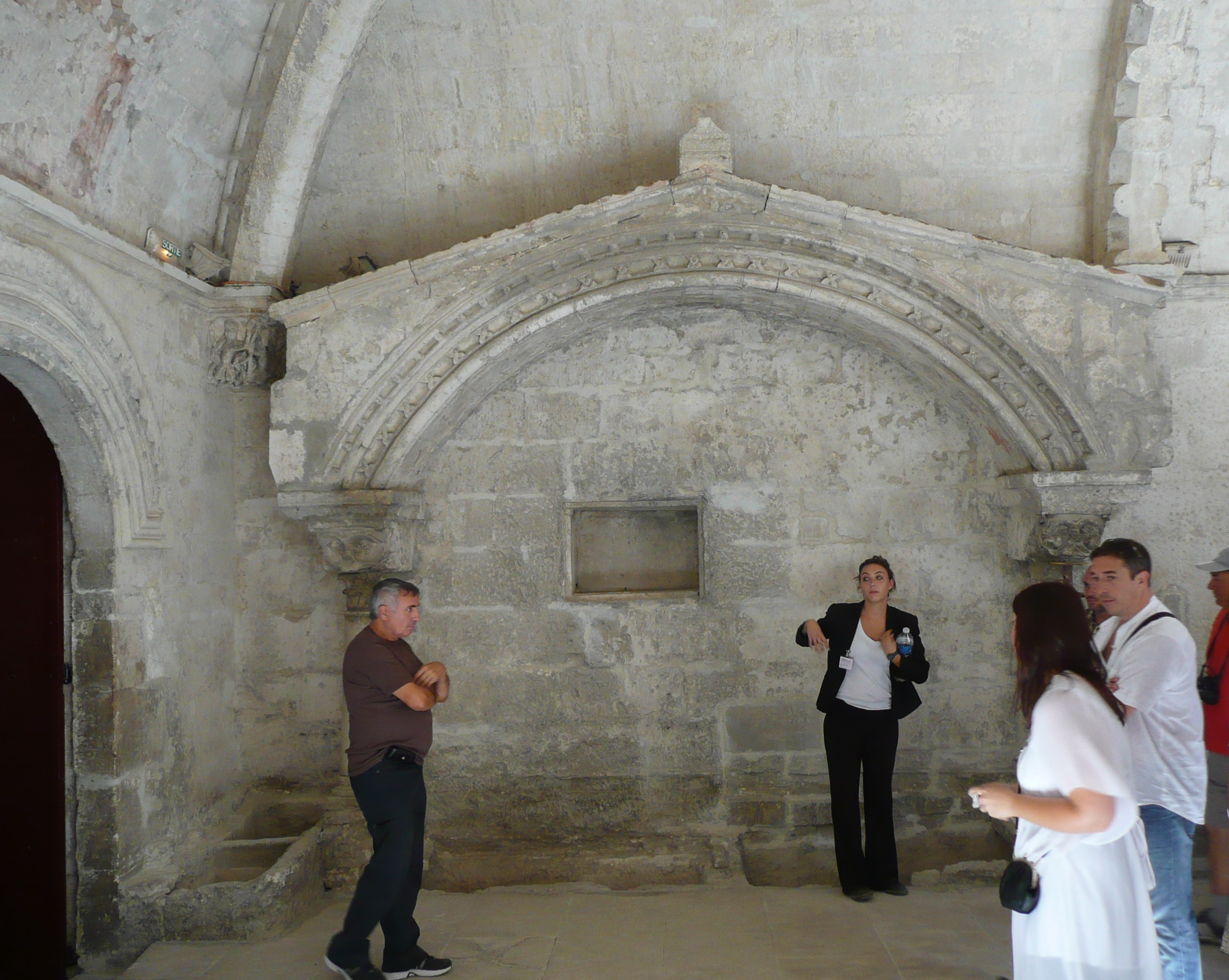 Arles (Bouches-du-Rhône_France), abbaye de Montmajour, cloître, à l'angle nord-ouest, enfeu des comtes de Provence dont Geoffroy Ier.